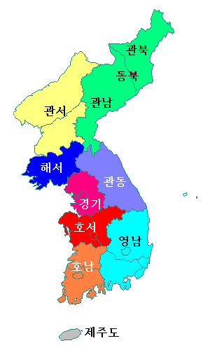 Korean Region Map